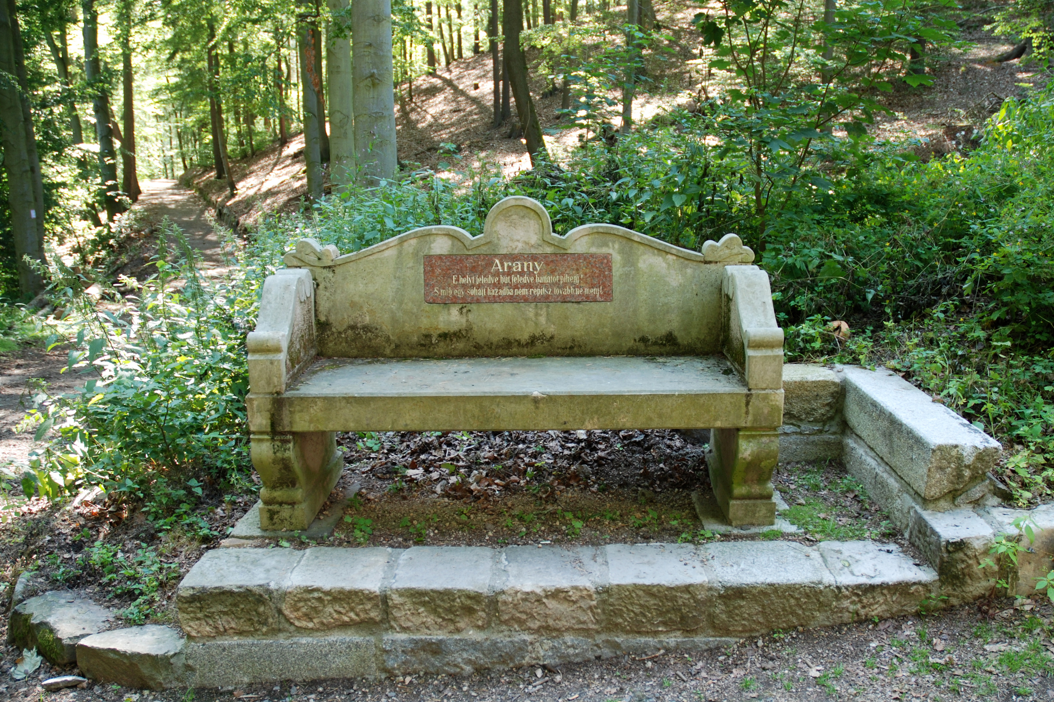 Lavička u kaple Ecce homo v karlovarských lázeňských lesích, připomínající lázeňské pobyty maďarského básníka Jánose Aranyho